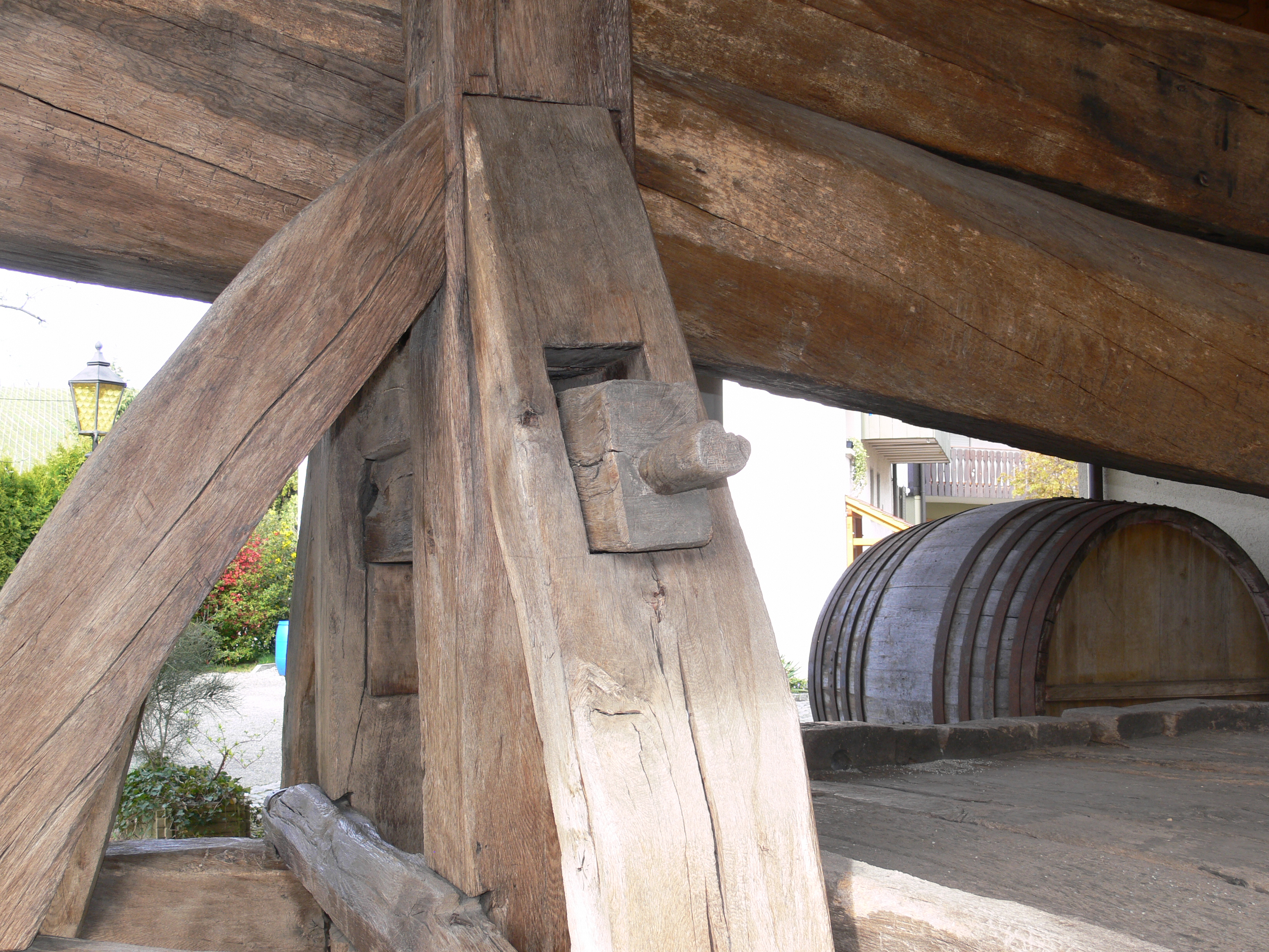 Bermatinger Torkel, Bermatingen, Bodenseekreis